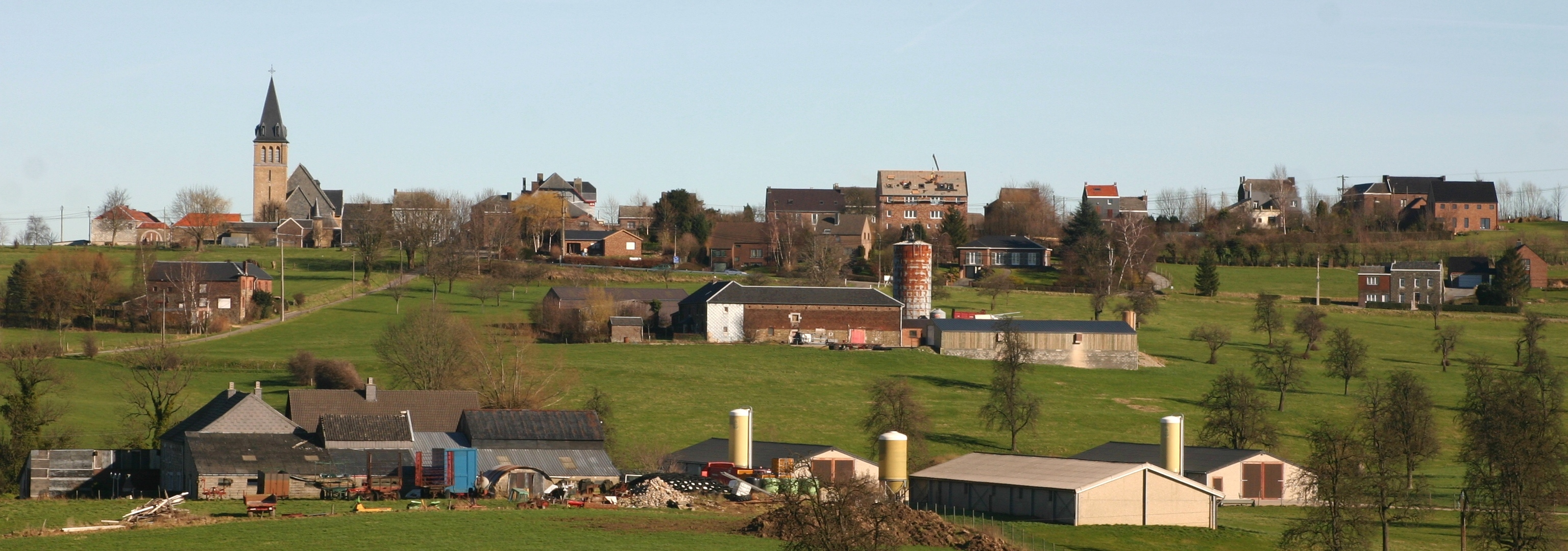 Julémont vu Mortier aus gesinn.